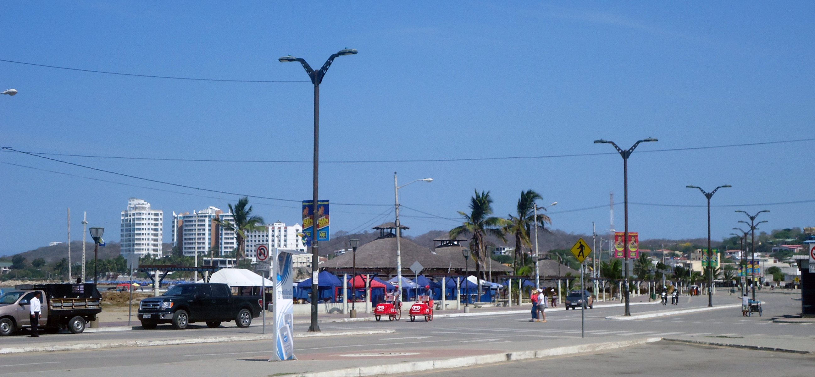 Vista del Malecón de Playas